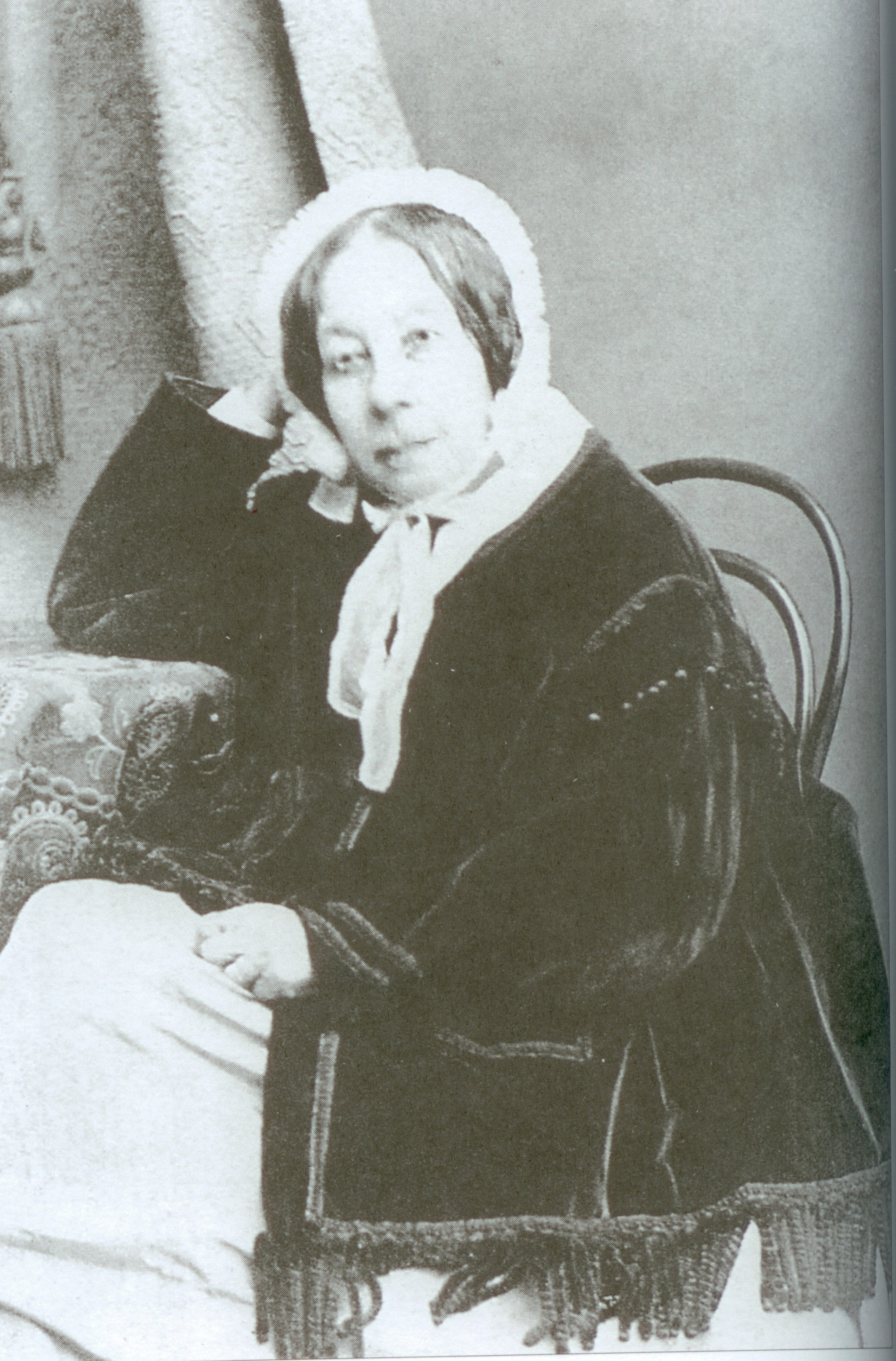 Екатерина Петровна Риччи, урожденная Лунина (1787-1886)